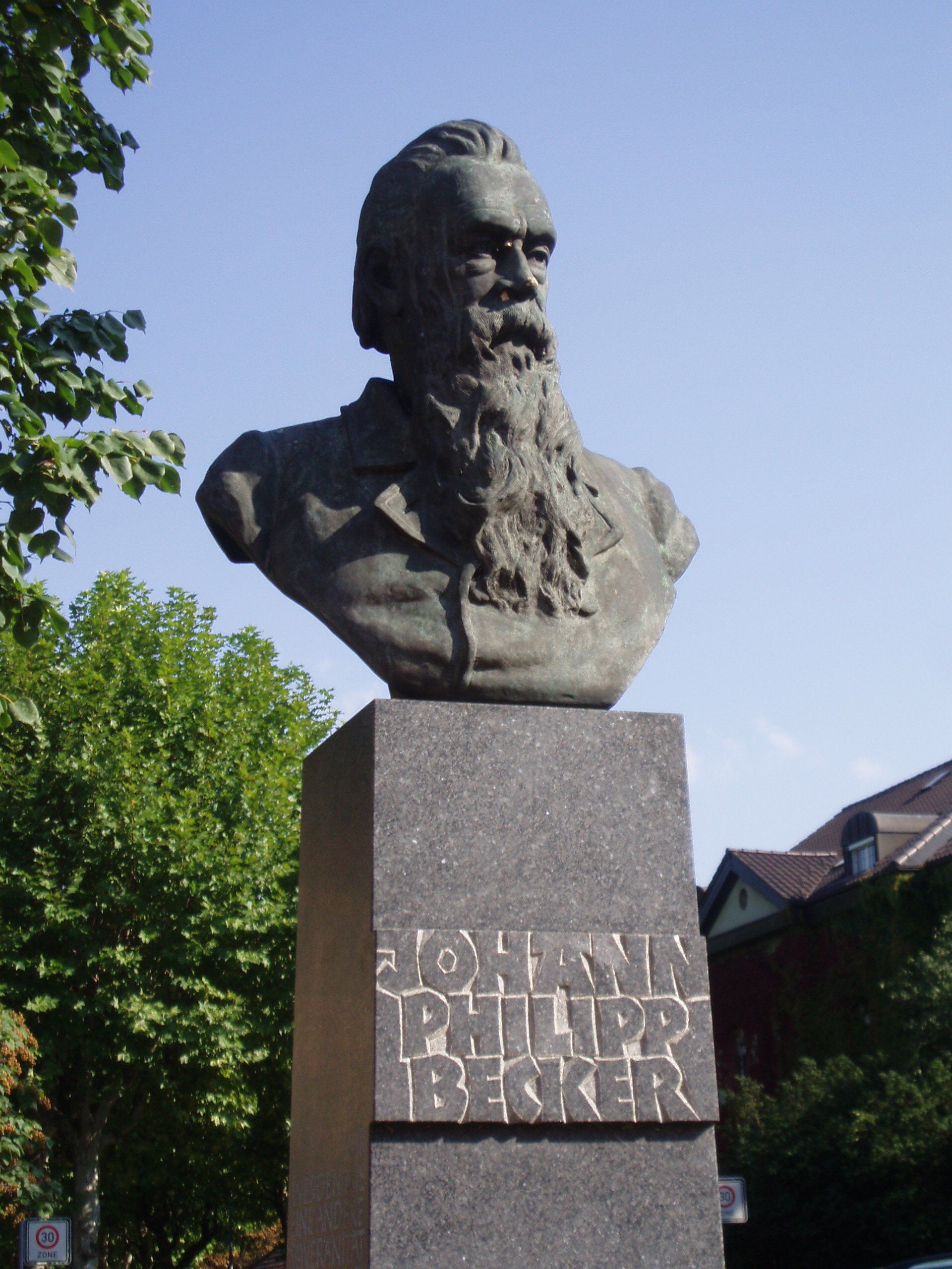 Büste Joh. Phil. Beckers in Frankenthal